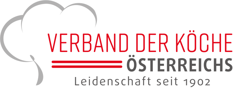 Aktuelles Logo des Verband der Köche Österreichs